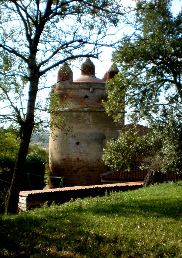 Montgeard